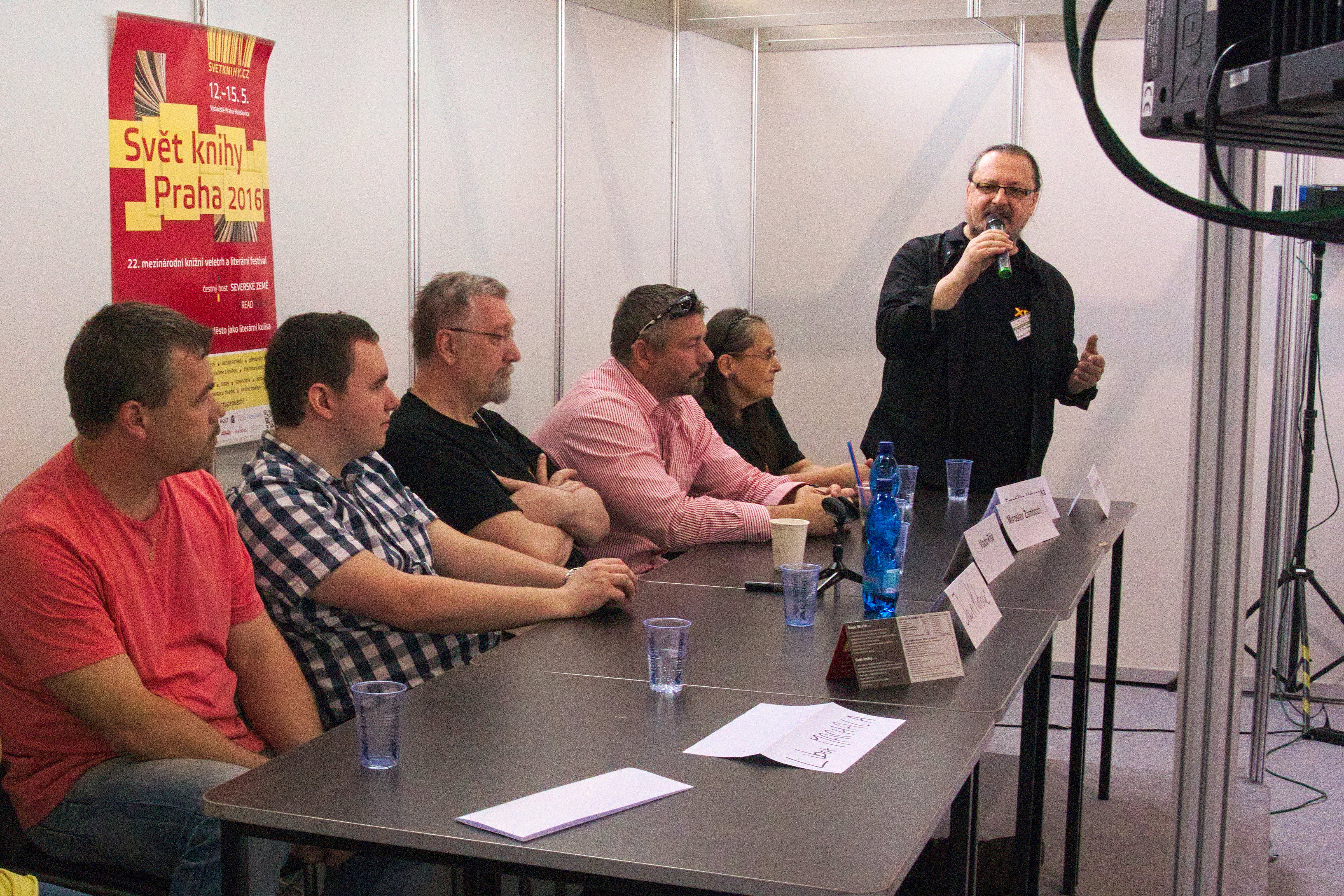 Autoři série Agent JFK na Světu knihy 2016 (zleva Libor Machala, Jan Kotouč, Vlado Ríša, Miroslav Žamboch, Františka Vrbenská, Jiří W. Procházka). Výstaviště Praha Holešovice.